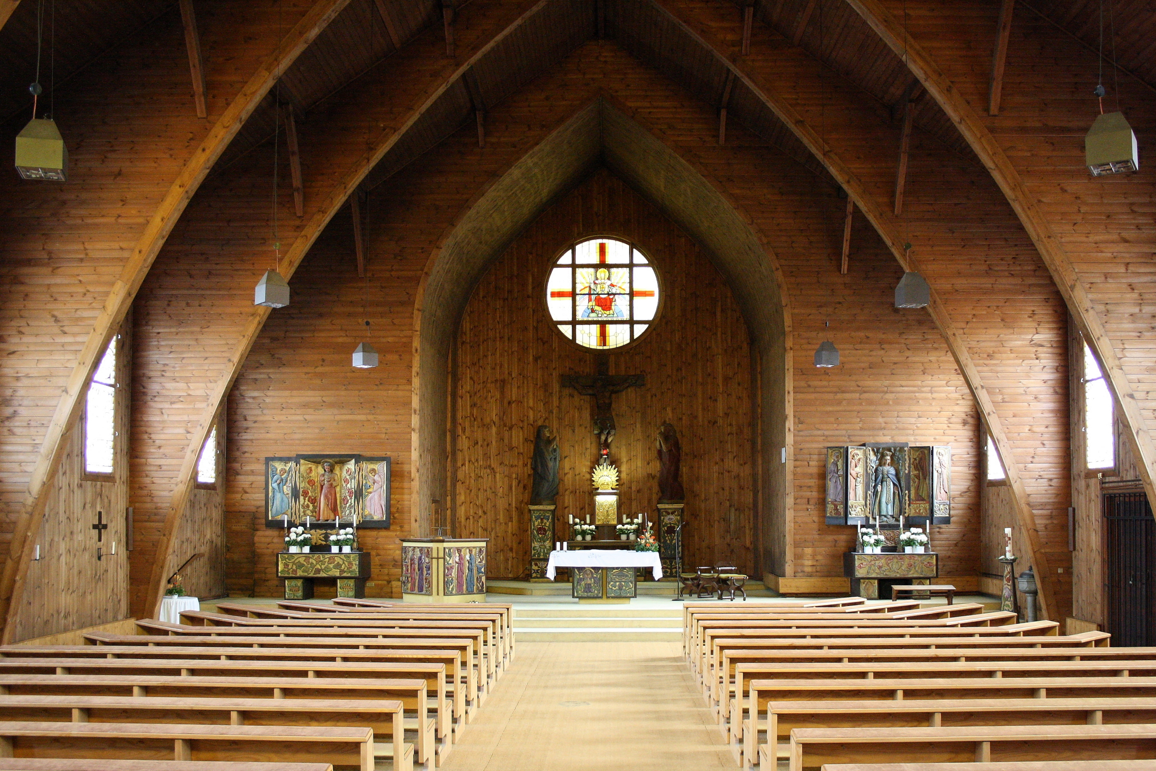 Innenansicht der Muttergotteskirche im Augarten im 2. Wiener Gemeindebezirk Leopoldstadt.